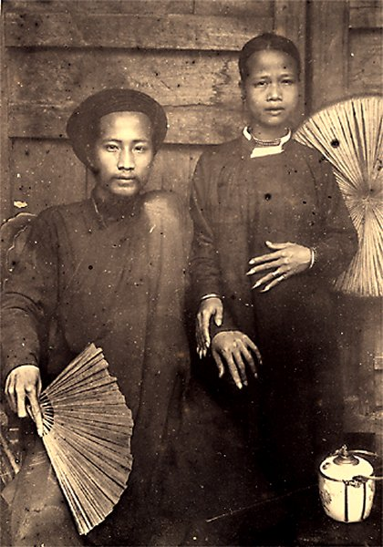 Joseph Lai, thông dịch viên của Tổng-Ðốc Hà Nội